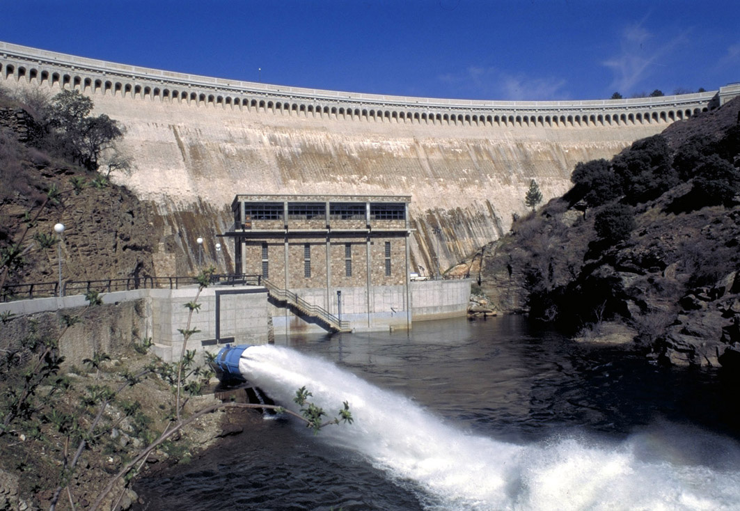 La presa de Puentes Viejas, situada sobre el río Lozoya, pertenece al Canal de Isabel II. Su superficie total es de 292 hectáreas, tiene una capacidad de 53 hectómetros cúbicos, y su altura es de 66 metros.